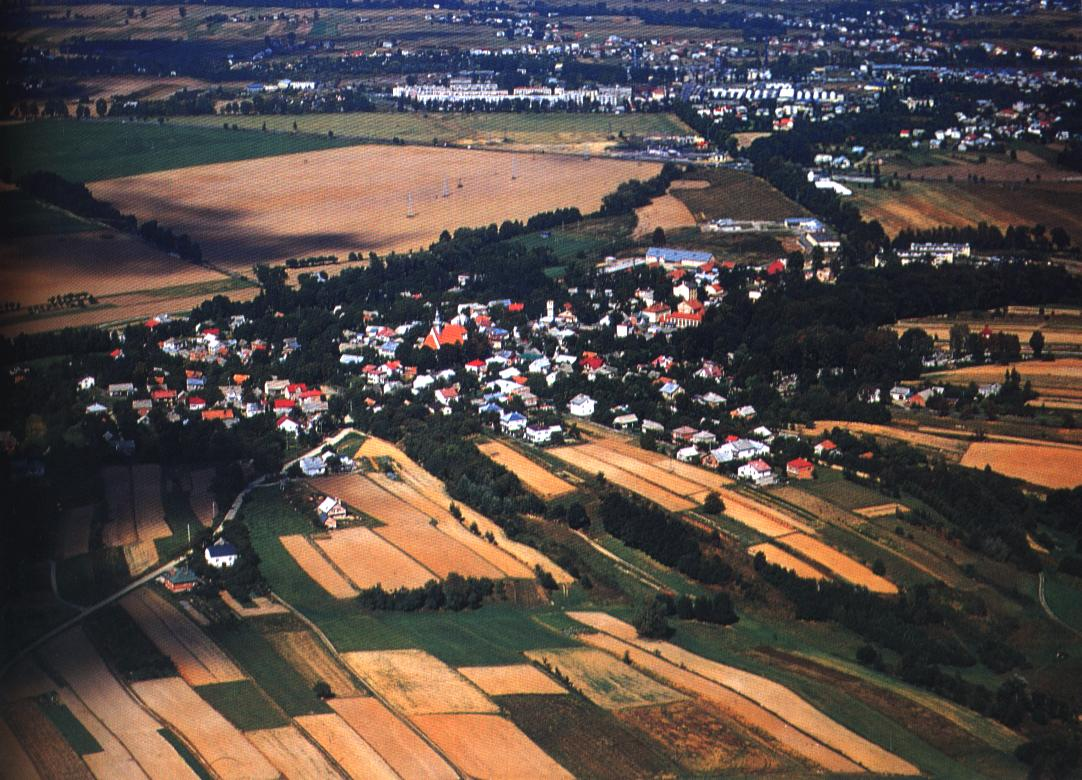 Gora Ropczycka z lotu ptaka